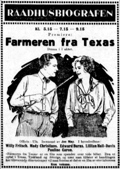 Avisreklame for filmen fra Aftenposten